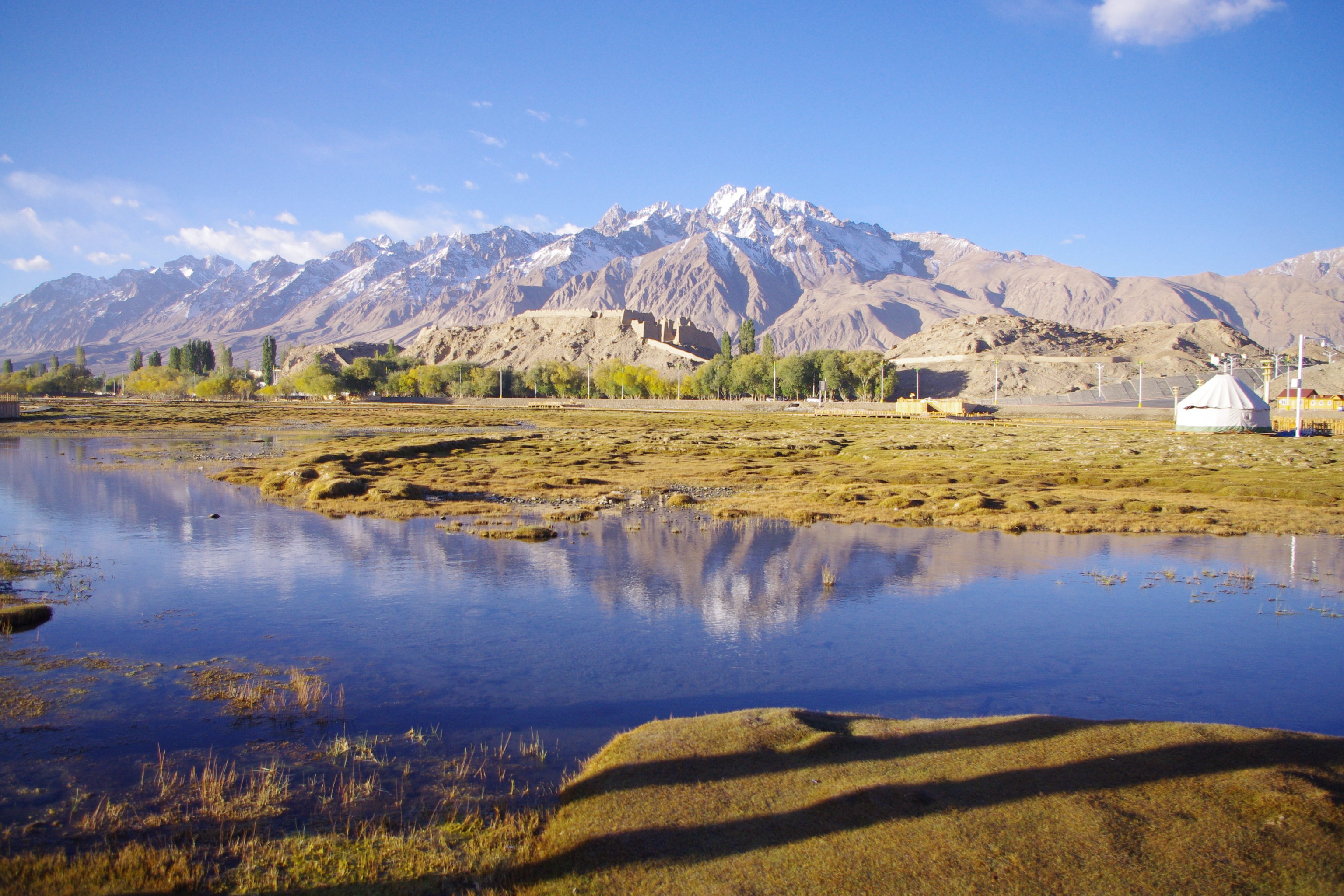 喀什地区塔什库尔干塔吉克自治县石头城遗址远景